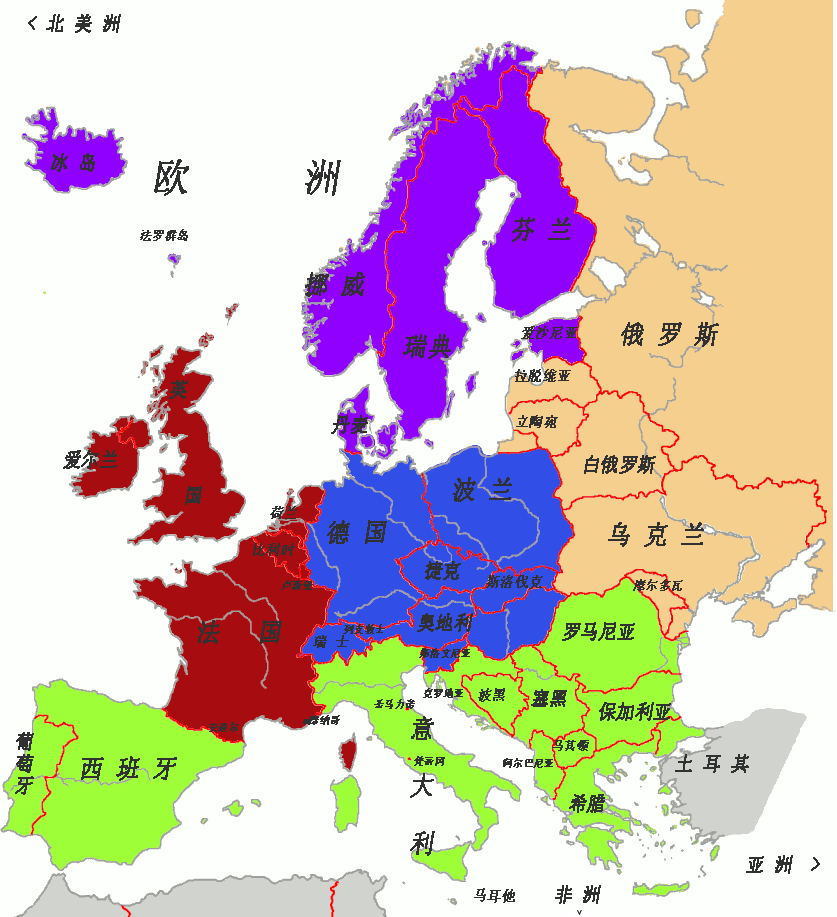 根据英文版Image:Europe colour coded.png修改。 不同的颜色表示欧洲的不同地区。 黄色：东欧 紫色：北欧 红色：西欧 蓝色：中欧 绿色：南欧